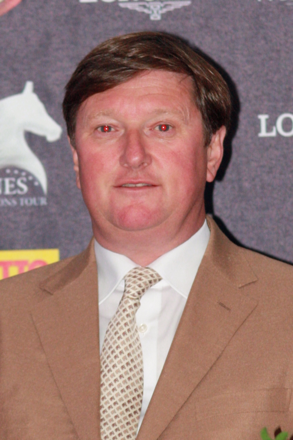 77. Internationales Pfingstturnier Wiesbaden 2013, Jan Tops während einer Pressekonferenz Personality rights warning Although this work is freely licensed or in the public domain, the person(s) shown may have rights that legally restrict certain re-uses unless those depicted consent to such uses. In these cases, a model release or other evidence of consent could protect you from infringement claims.